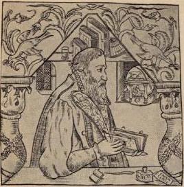 Rasmus Hjort (Erasmus Cervinus), en av Oslo-humanistene.